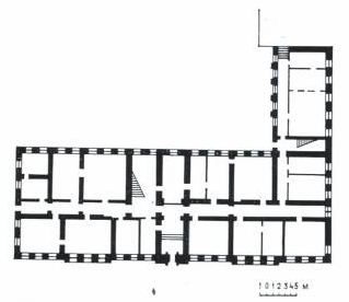 План 1-га паверха будынка Магілёўскай мужчынскай гімназіі (Ленінская, 41)